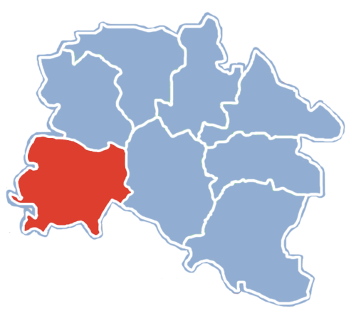 Położenie gminy Działoszyn na mapie powiatu pajęczańskiego.